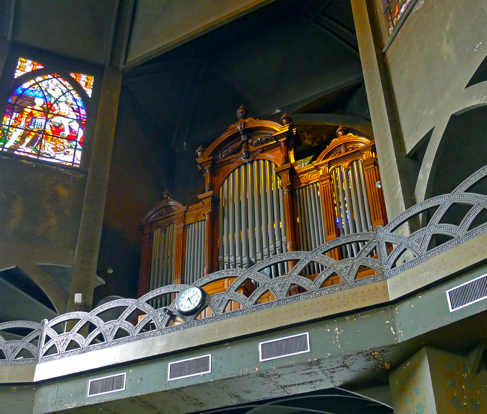 Église Saint-Jean de Montmartre (orgue) - Paris XVIII